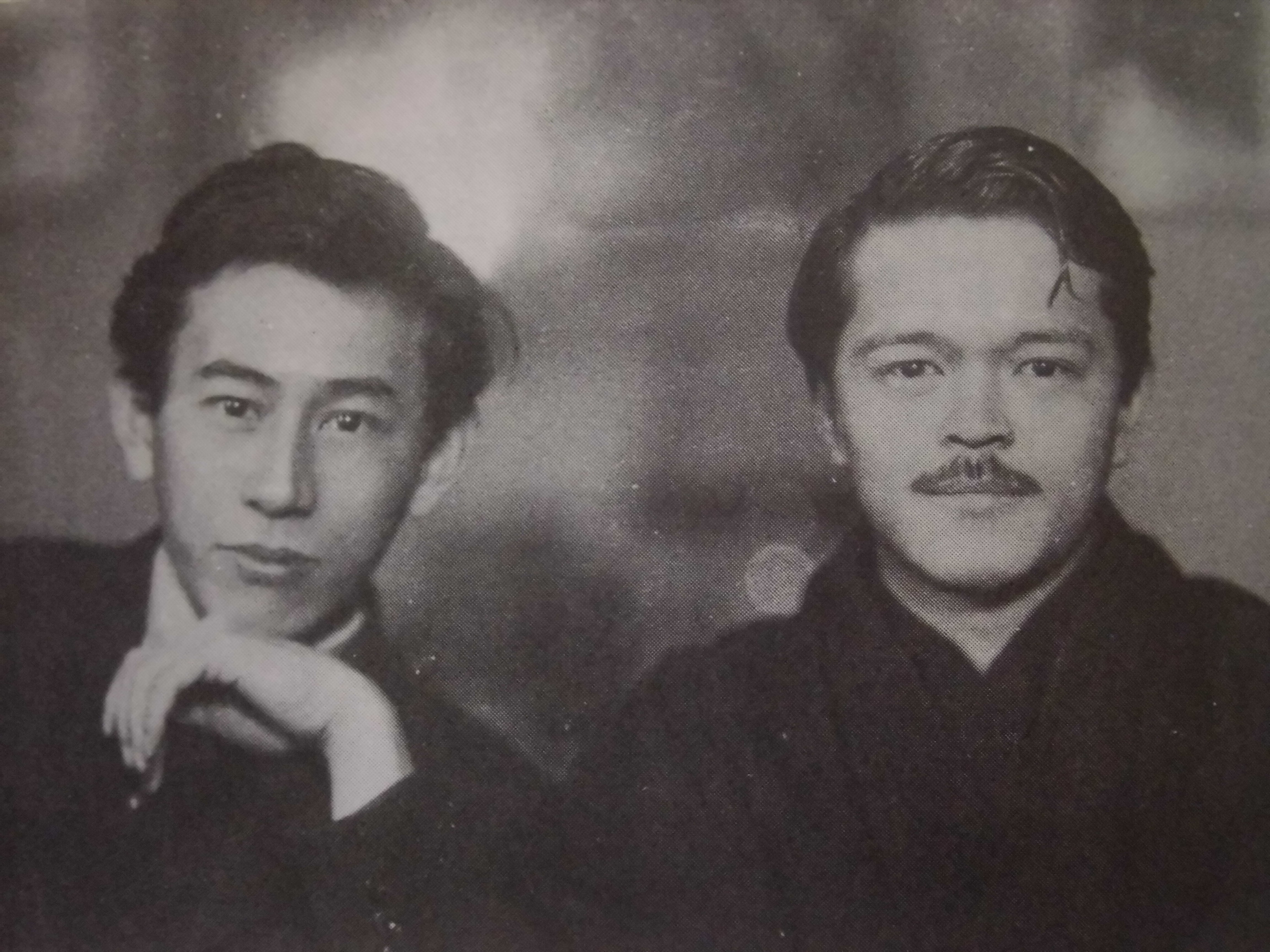 青山二郎と石丸重治（Aoyama Zirou and Ishimaru Zyuuzi）